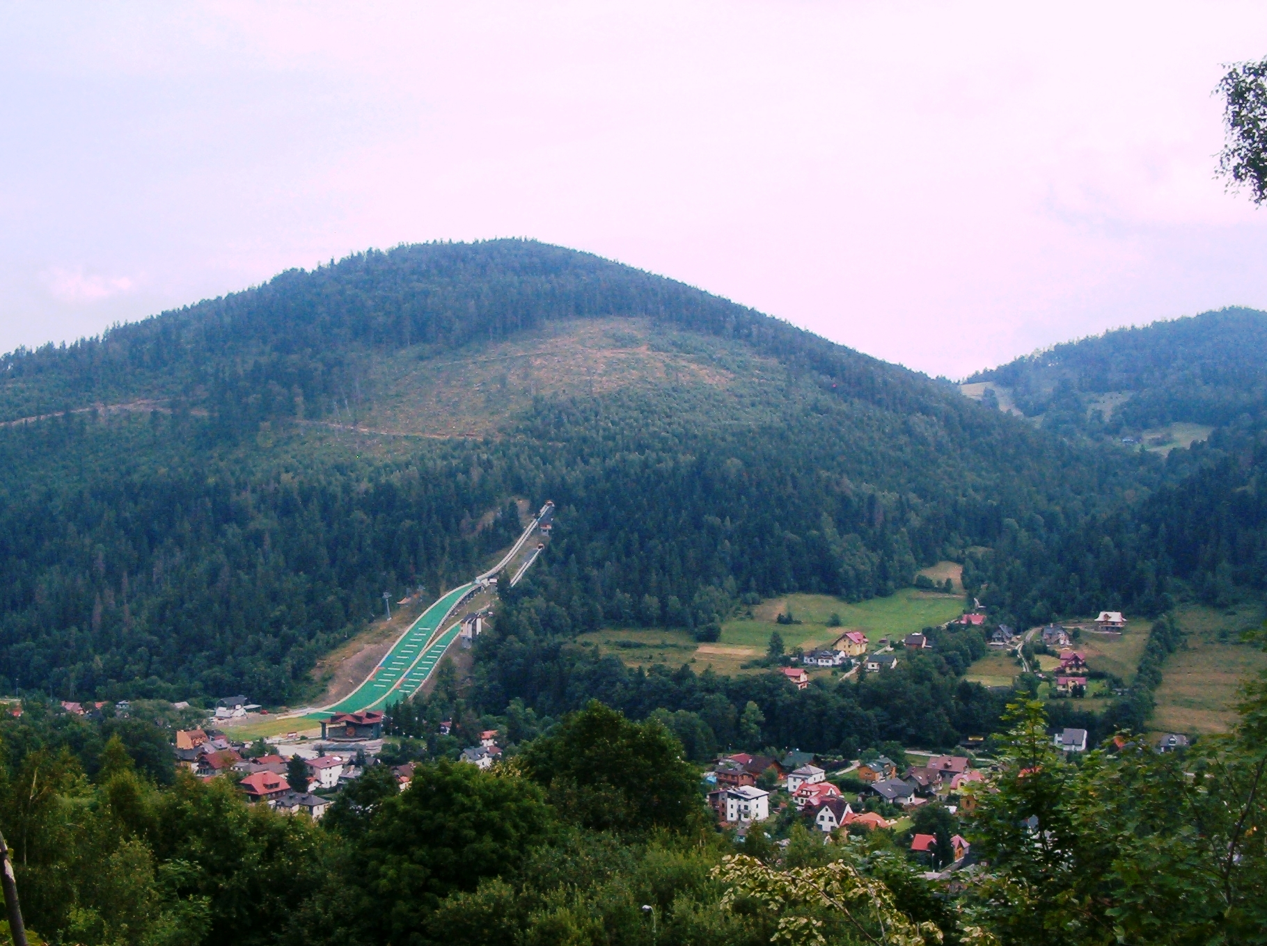 Szczyt Skalite w Szczyrku